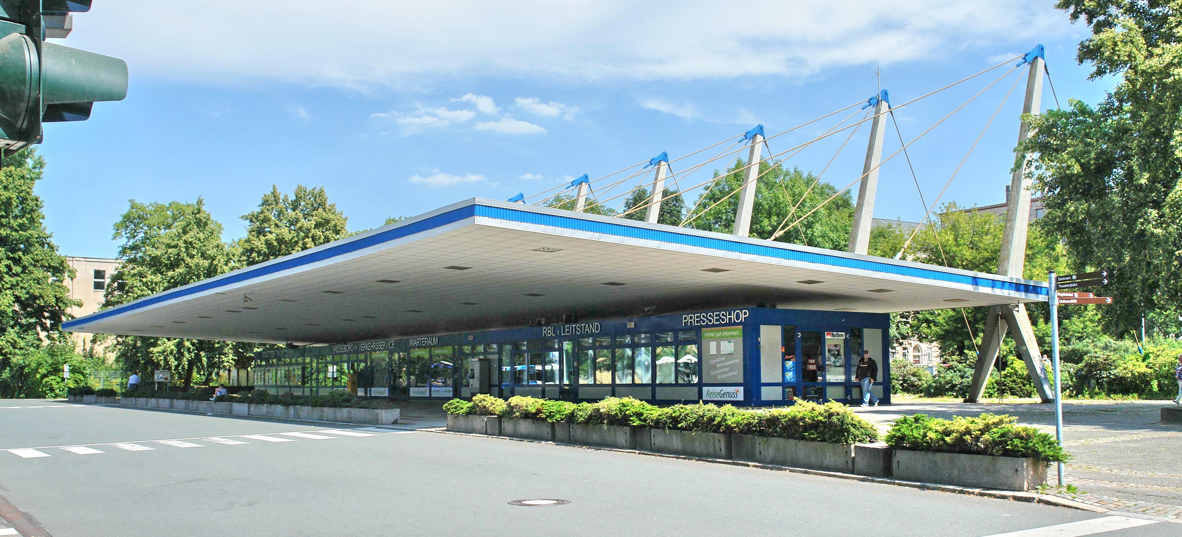 Busbahnhof Chemnitz